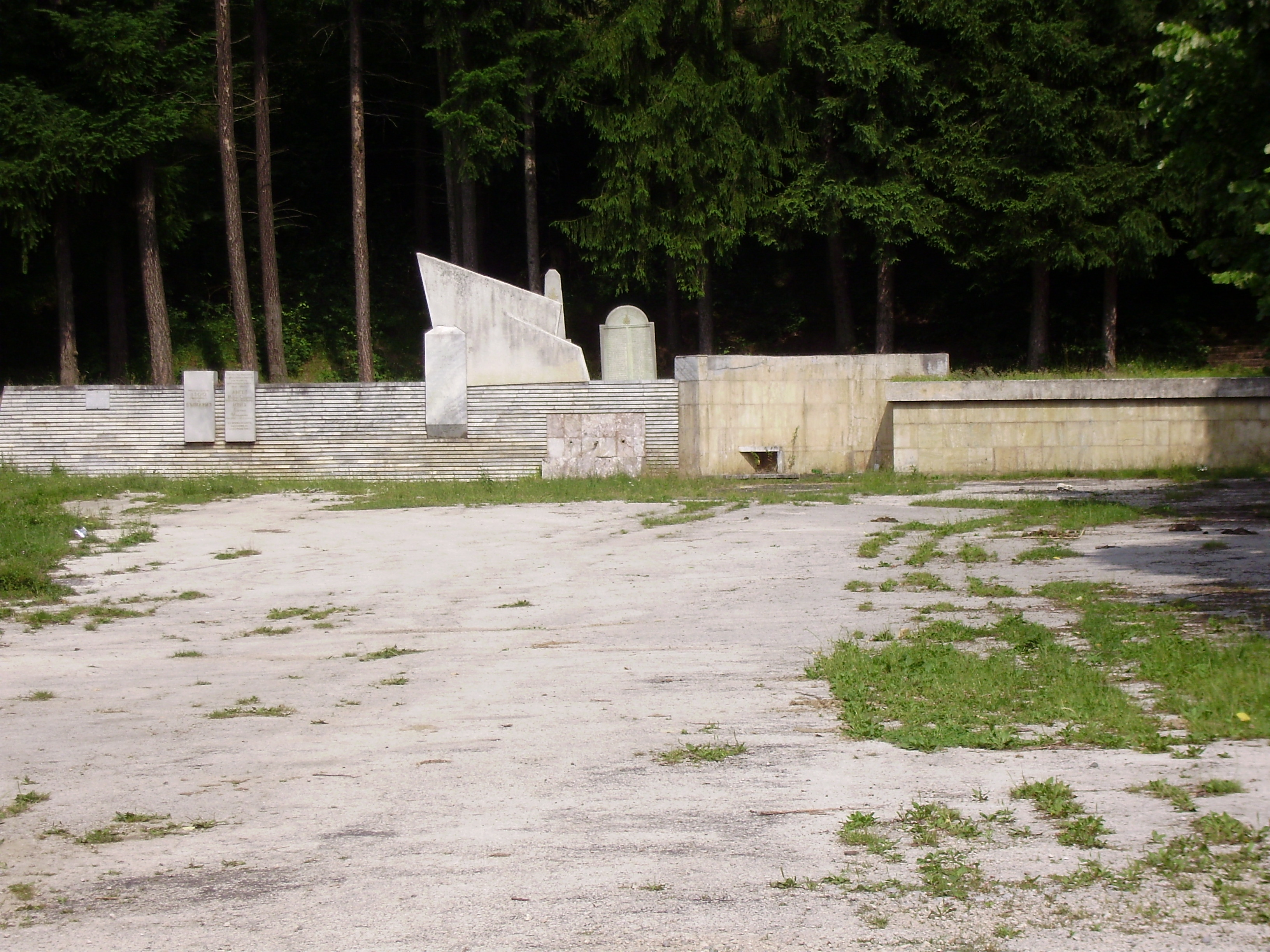 Паметник в село Стакевци.